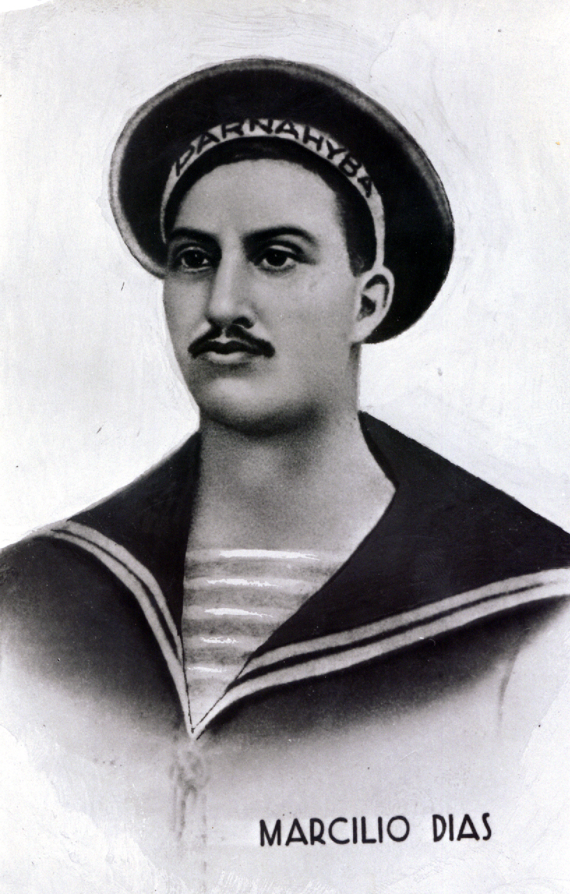 Sagrou-se herói na Batalha Naval do Riachuelo, em 11 de junho de 1865, no início da Guerra da Tríplice Aliança. Quando a corveta Parnaíba, onde chefiava o rodízio raiado de ré, foi abordada por três navios paraguaios, travou uma luta corpo a corpo contra quatro inimigos, armado de sabre, abatendo dois deles.[1] Na luta teve seu braço decepado na defesa da bandeira do Brasil. Os ferimentos sofridos causaram-lhe a morte no dia seguinte, 12 de junho, com apenas 27 anos de idade, sendo sepultado com as honras do cerimonial marítimo nas próprias águas do rio Paraná, em 13 de junho de 1865.[1] Arquivo liberado pela Marinha do Brasil através de projeto GLAM com Wiki Educação Brasil